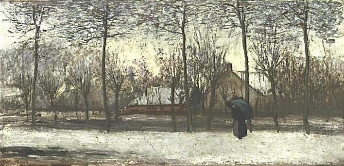 Willem Maris (1844-1910): Winter in het dorp (Winter in the village)